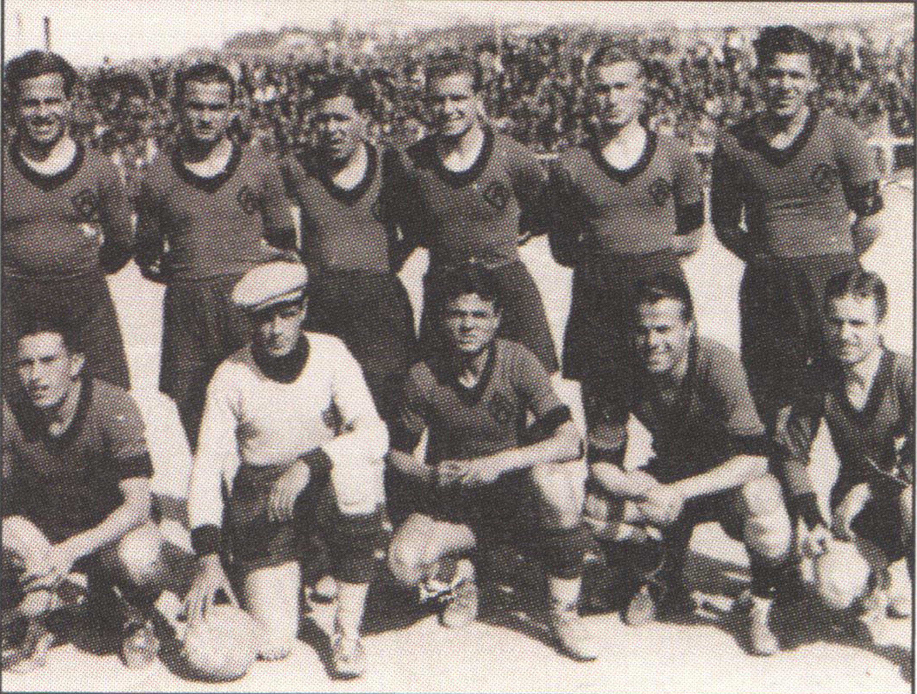 Mvskoke: H ομάδα του Άρη πρωταθλήτρια Θεσσαλονίκης το 1938